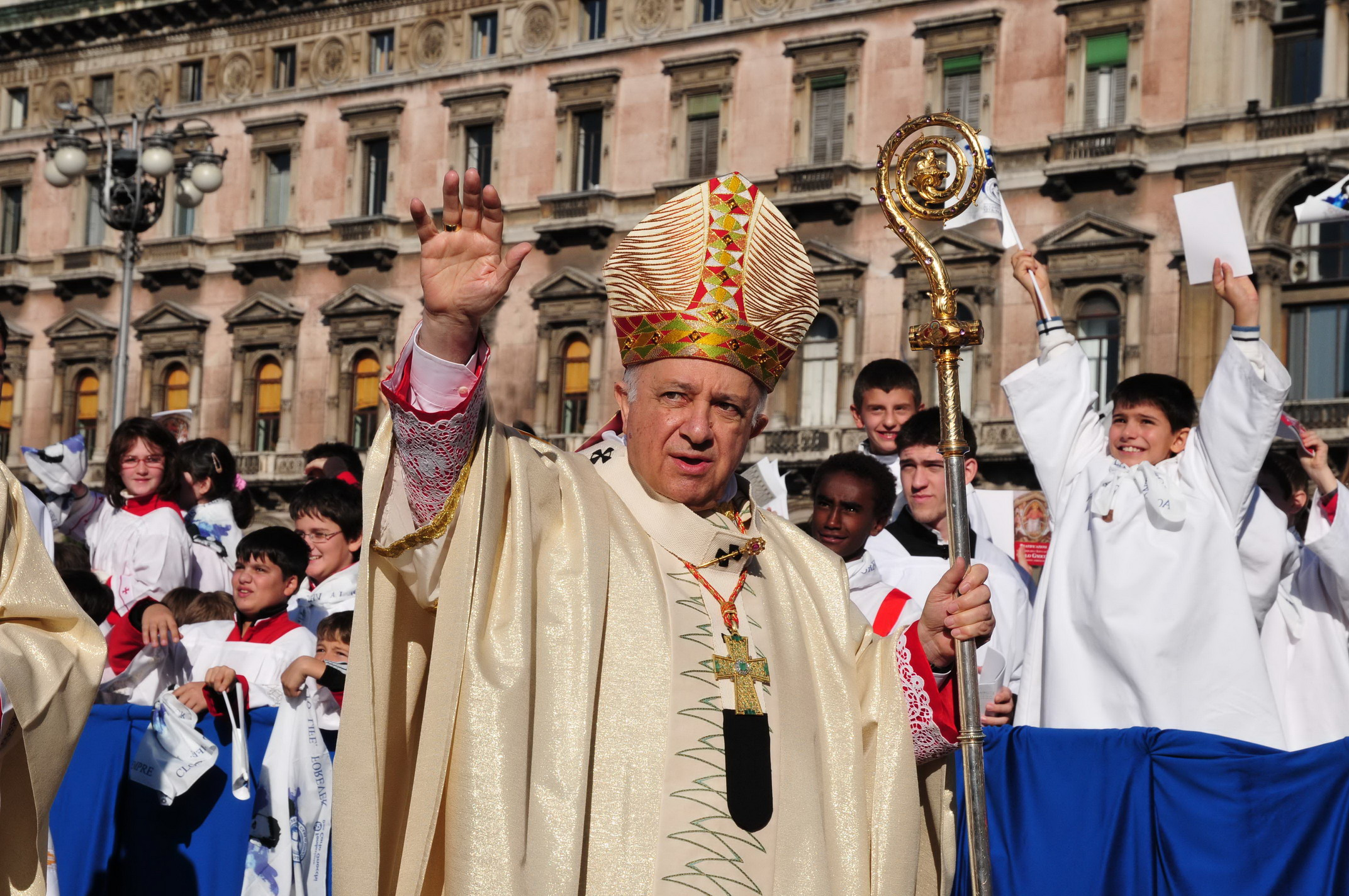 Cardinale Dionigi Tettamanzi